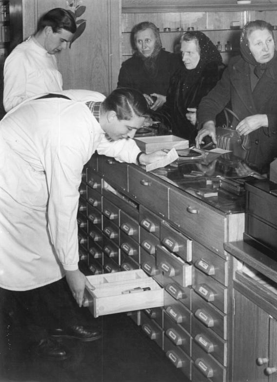 Königs Wusterhausen, Apotheke, Innenansicht Zentralbild Krueger Wjt-Sta.-Ho. 23 Mot. 25.3.1954 "Märkische Apotheke" Königs Wusterhausen sichert die Versorgung der Landbevölkerung mit Medikamenten und Arzneien Die "Märkische Apotheke" in Königs Wusterhausen ist zu einem wichtigen Bindeglied zwischen Arzt und Patienten geworden. Diese staatlich verwaltete Apotheke gibt durch ihre vorbildlichen Einrichtungen, dem qualifizierten Fachpersonal und der darüber hinaus in den Laboratorien geleisteten wissenschaftlichen Arbeit, dem Arzneimittelempfänger die Gewähr für die Abgabe richtig dosierter Medikamente hochwertiger Qualität. Als Ausbildungsstätte für den Nachwuchs auf dem Gebiet des Apothekenwesens und der Pharmazie ist die "Märkische Apotheke" Königs Wusterhausen, die 1953 ihren Neubau in der Nähe des Bahnknotenpunktes Königs Wusterhausen beziehen konnte, in den Mittelpunkt des Interesses auf dem Gebiete des Gesundheitswesens gerückt. UBz: Eine doppelte Kontrolle wird bei der Arzneimittelabgabe in der Officin durchgeführt. Nach der Abgabe des Rezeptes bringen die Apothekenhelferinnen aus den nahegelegenen Räumen das benötigte Medikament zur Officin. Die Annahme des Rezeptes, sowie die Ausgabe der Arzneimittel erfolgen durch einen approbierten Apotheker. (vlnr) Apothekenassistent Siegfried Gädicke (der Vater ist Arzt) hat aus der Homöopathie Medikamente gebracht, die der Apotheker Raddatz, der Aufsicht in der Officin führt, an die Bäuerinnen, Frau Keil und Frau Becker, aus Friedland und Frau Kranig aus Güntersdorf Kreis Beeskow, abgibt.